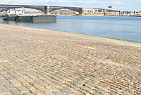 granite örnek